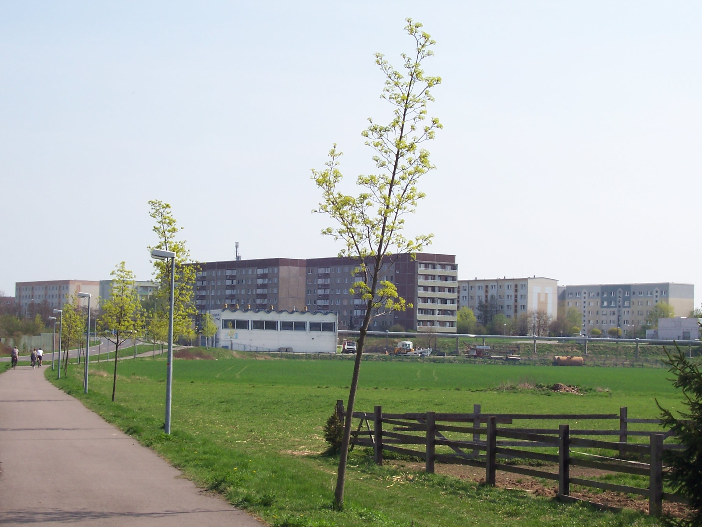 Plattenbausiedlung Windmühlenstraße in Eilenburg, Stadtteil Ost, aus der Ernst-Mey-Straße gesehen